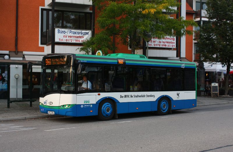 Alpino 8,6